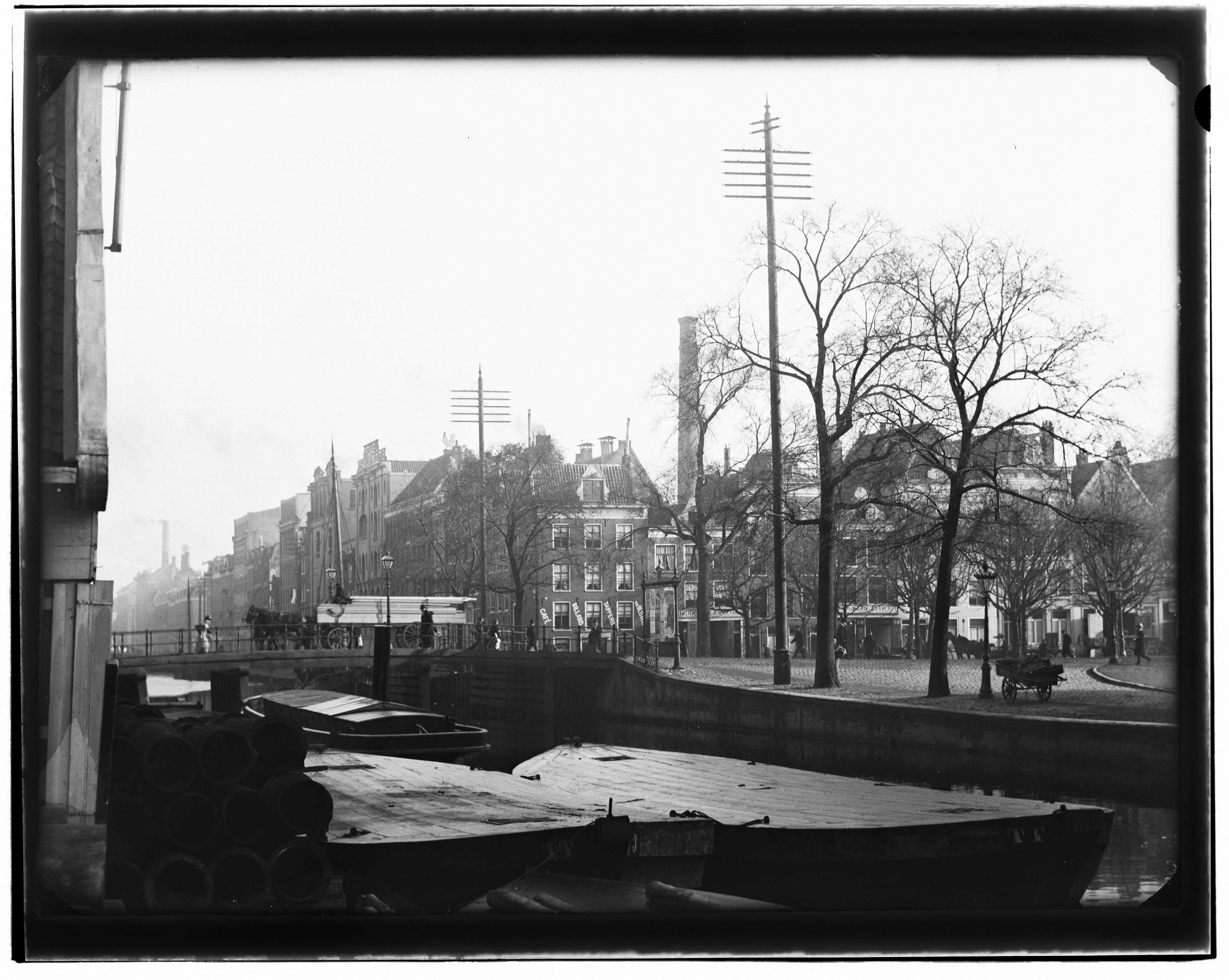 Beschrijving Nieuwe Achtergracht Gezien in oostelijke richting vanaf de Stratemakerswerf naar Weesperplein 1 t/m 9 (v.l.n.r.). Links houten loods Nieuwe Achtergracht 3 (oud nr.). Op de voorgrond draaibruggetje tegenover steegje naar Stadstimmertuin. Documenttype foto Vervaardiger Olie``, Jacob (1834-1905) Collectie Collectie Jacob Olie Jbz. Datering 1891 Geografische naam Achtergracht Inventarissen Afbeeldingsbestand 10019A000434 Generated with Dememorixer